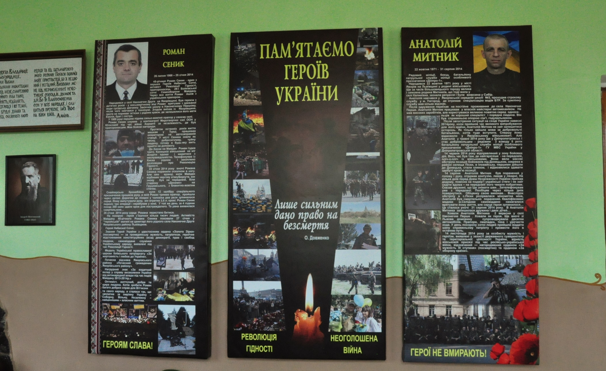 Стенд у школі с. Наконечне Перше з загиблими сельчанами Романом Сеником та Анатолієм Митником